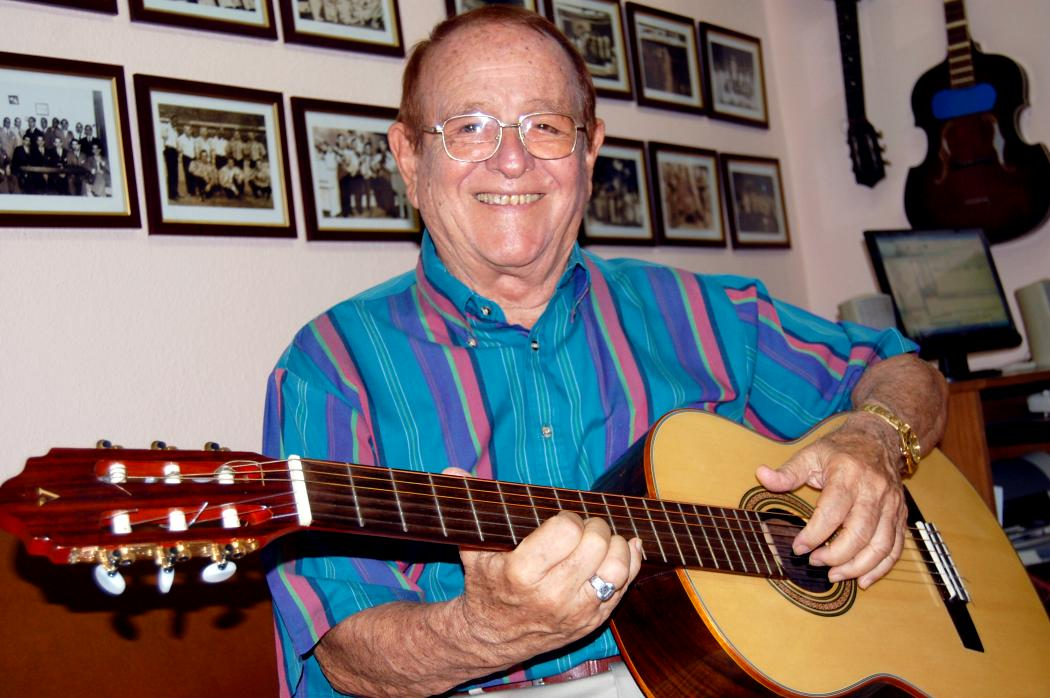 Senén Suárez Hernández es un compositor, arreglista, guitarrista y escritor cubano